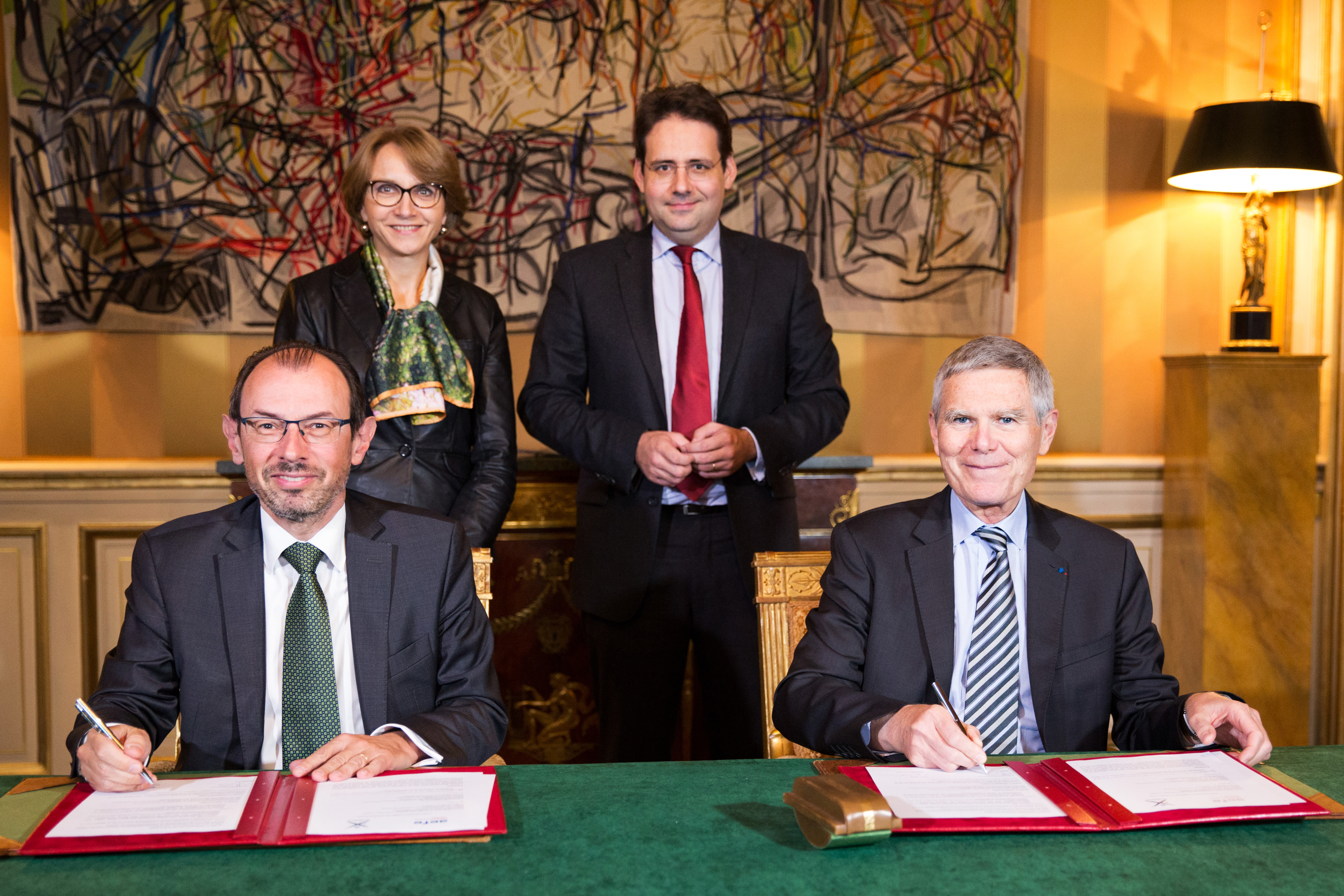 En présence de Matthias Fekl, Secrétaire d’État chargé du commerce extérieur, de la promotion du tourisme et des Français de l’étranger, l’École polytechnique et l’Agence pour l’enseignement français à l’étranger (AEFE) ont signé lundi 7 novembre 2016, une convention de partenariat visant à attirer en France des étudiants à haut potentiel Crédit photographique : © École polytechnique - J.Barande